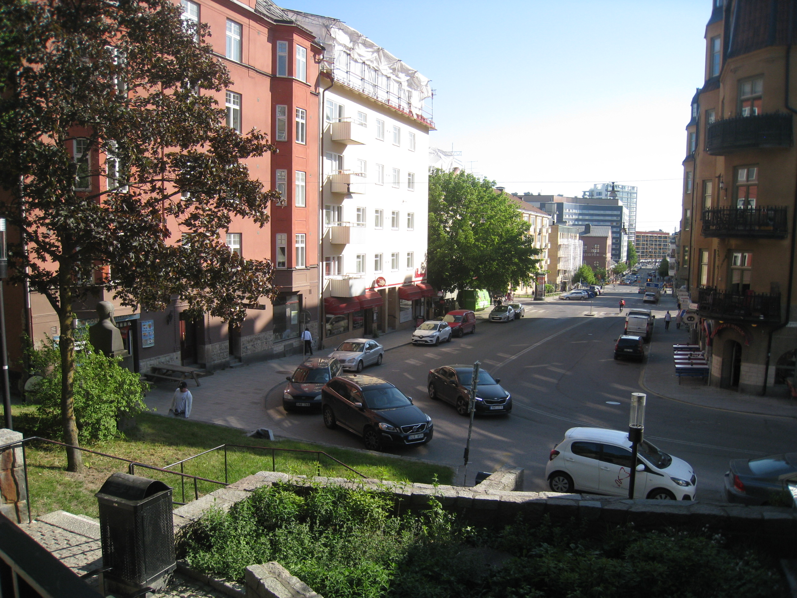 Vy över Esplanaden från Tornparken, Sundbyberg.